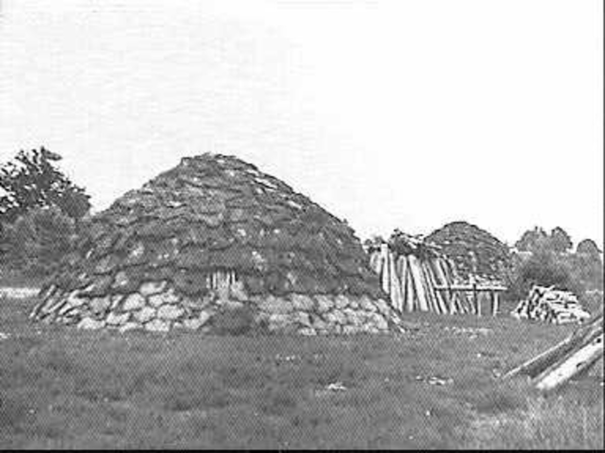 Houtskoolbranderij: brandstapels (opmerking: Deze afbeelding hebben wij helaas alleen in deze lage resolutie.)